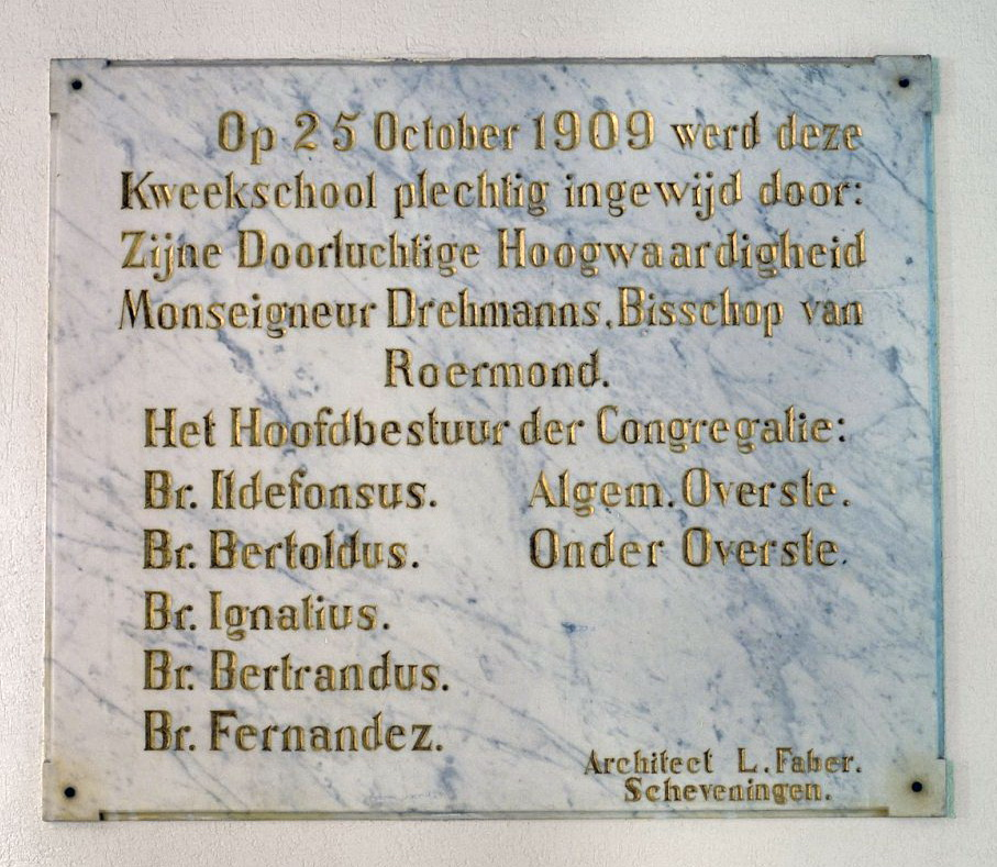 Trichter College: Interieur gang naar Kapel, plaquette met tekst